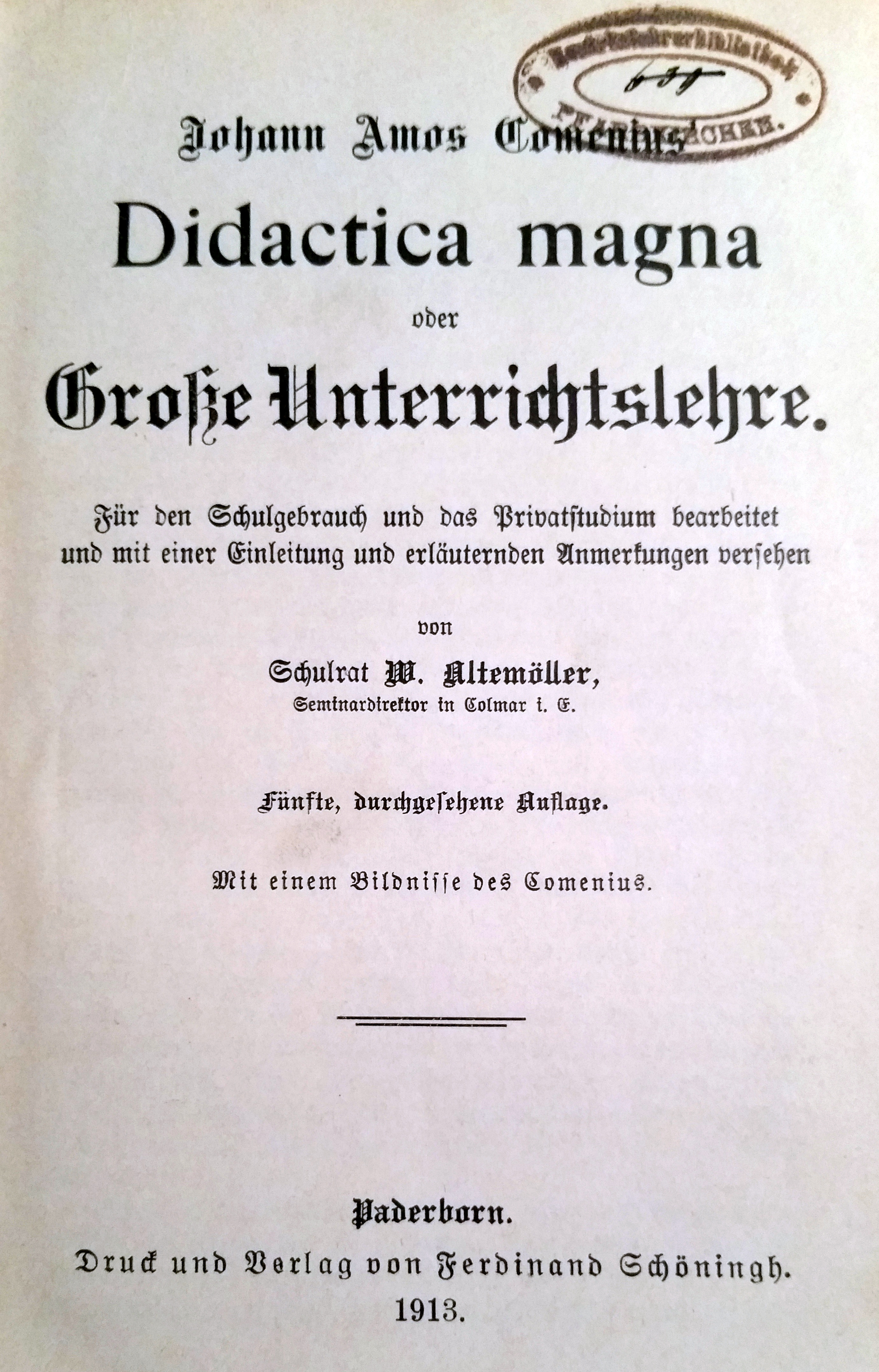 Johann Amos Comenius - Didactica Magna, Paderborn 1913, Titelseite